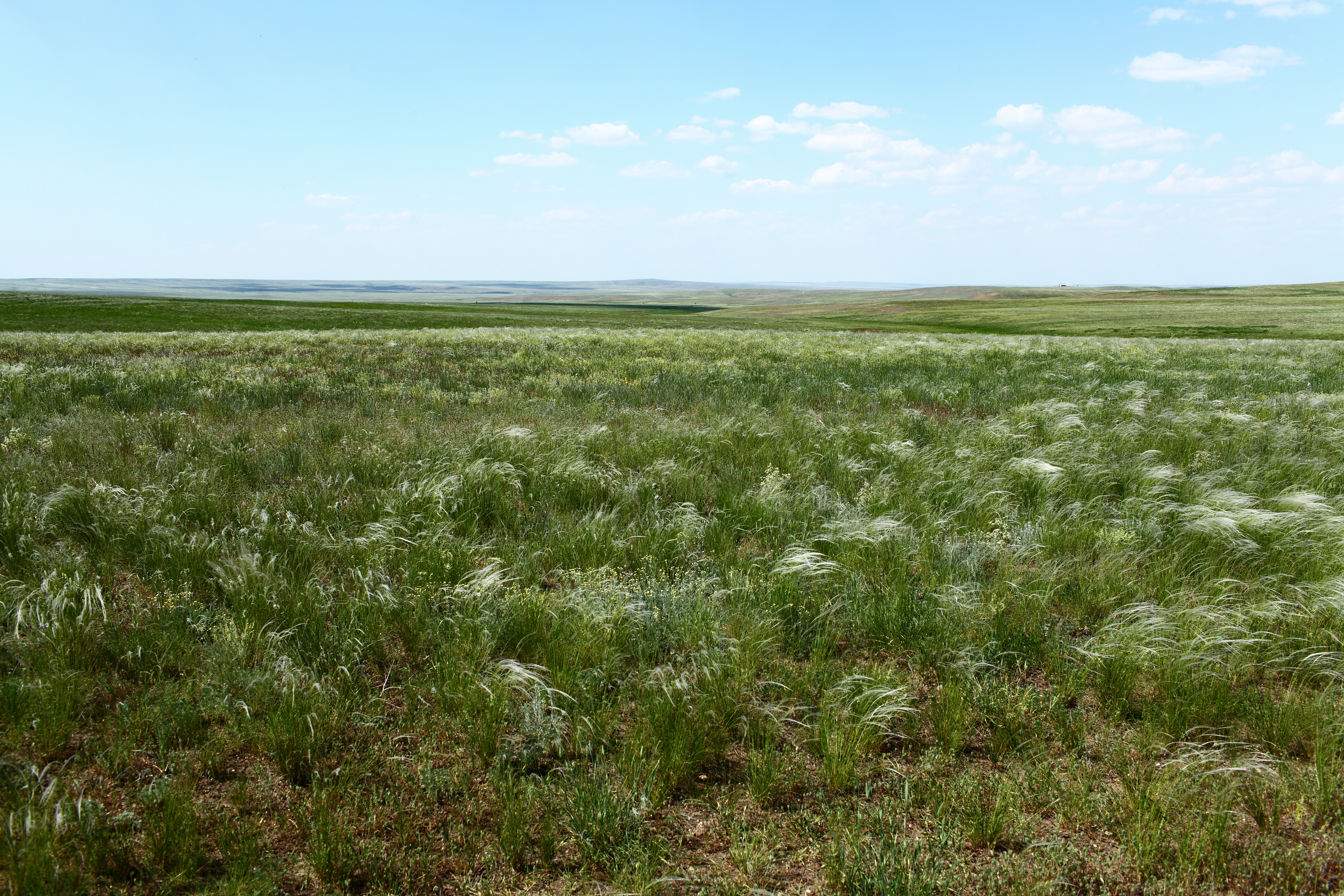 Оренбургская степь